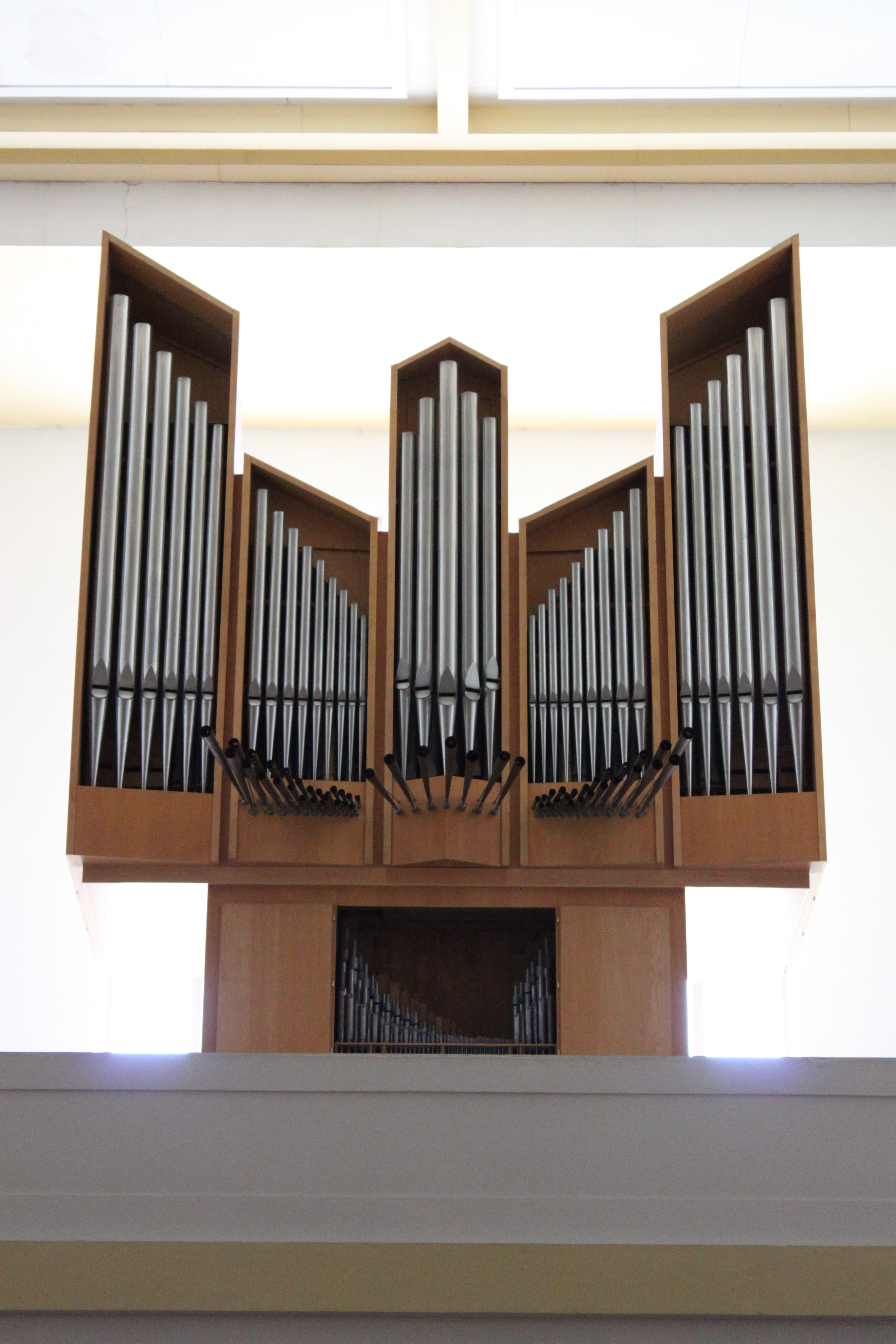 Orgel der Pfarrkirche Maria vom Berge Karmel in Wien X., errichtet 1963 von Orgelbau Walcker-Mayer